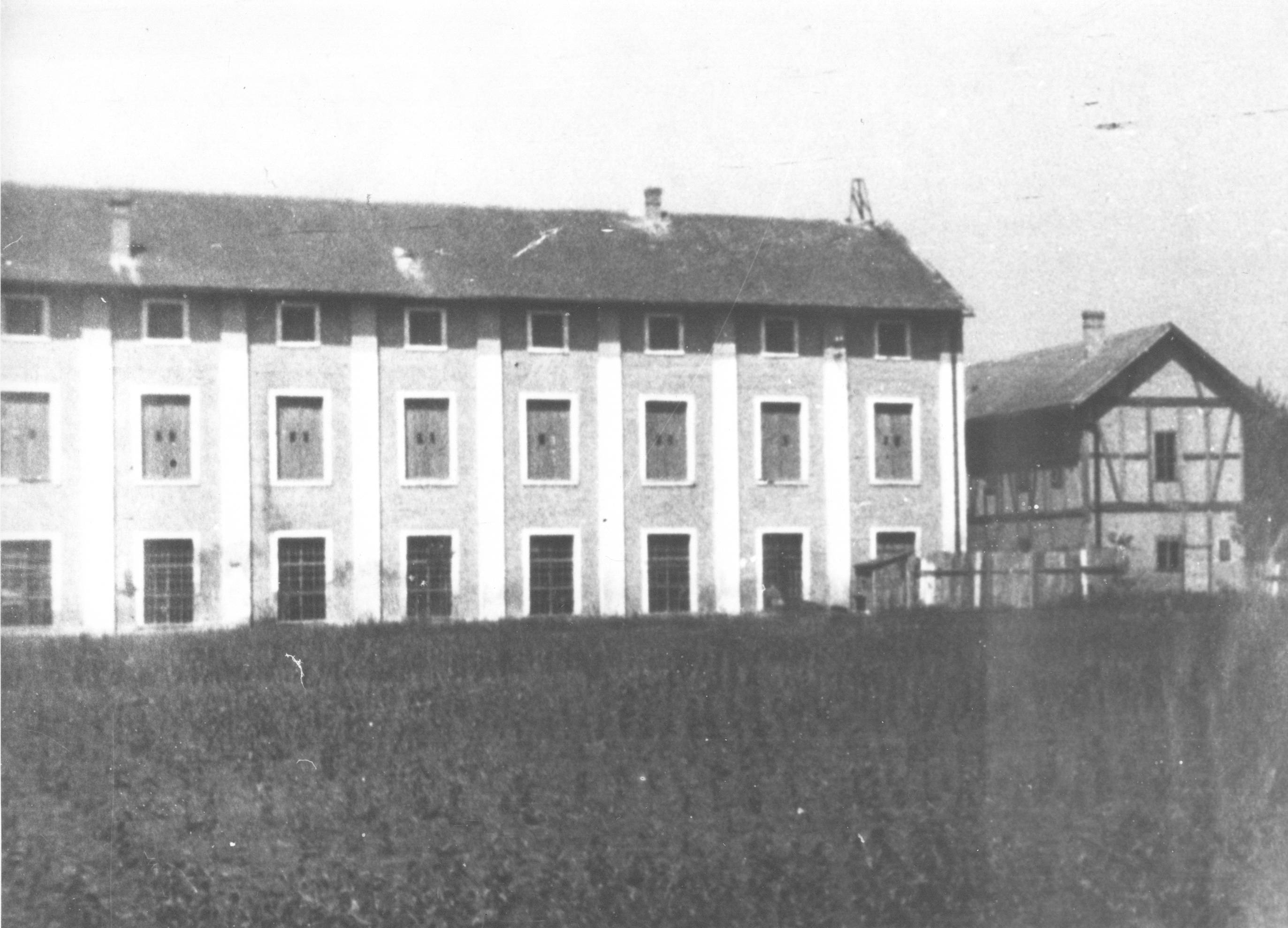 Srpskohrvatski / српскохрватски: Logor Svilara u Pančevu kroz koji je od leta do novembra 1941, kada je ukinut, prošlo 1600 ljudi.